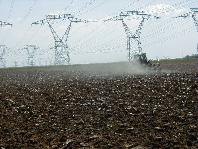 Labour d'un champ à l'aide d'un tracteur. Photo prise aux environs de Villebon-sur-Yvette, dans l'Essonne.